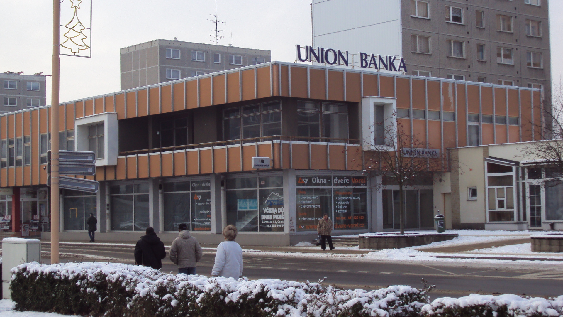 Zrušená pobočka Union banky